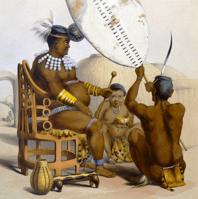 Mpande